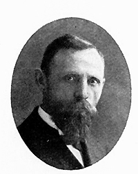 Sven Linders (1873-1932)